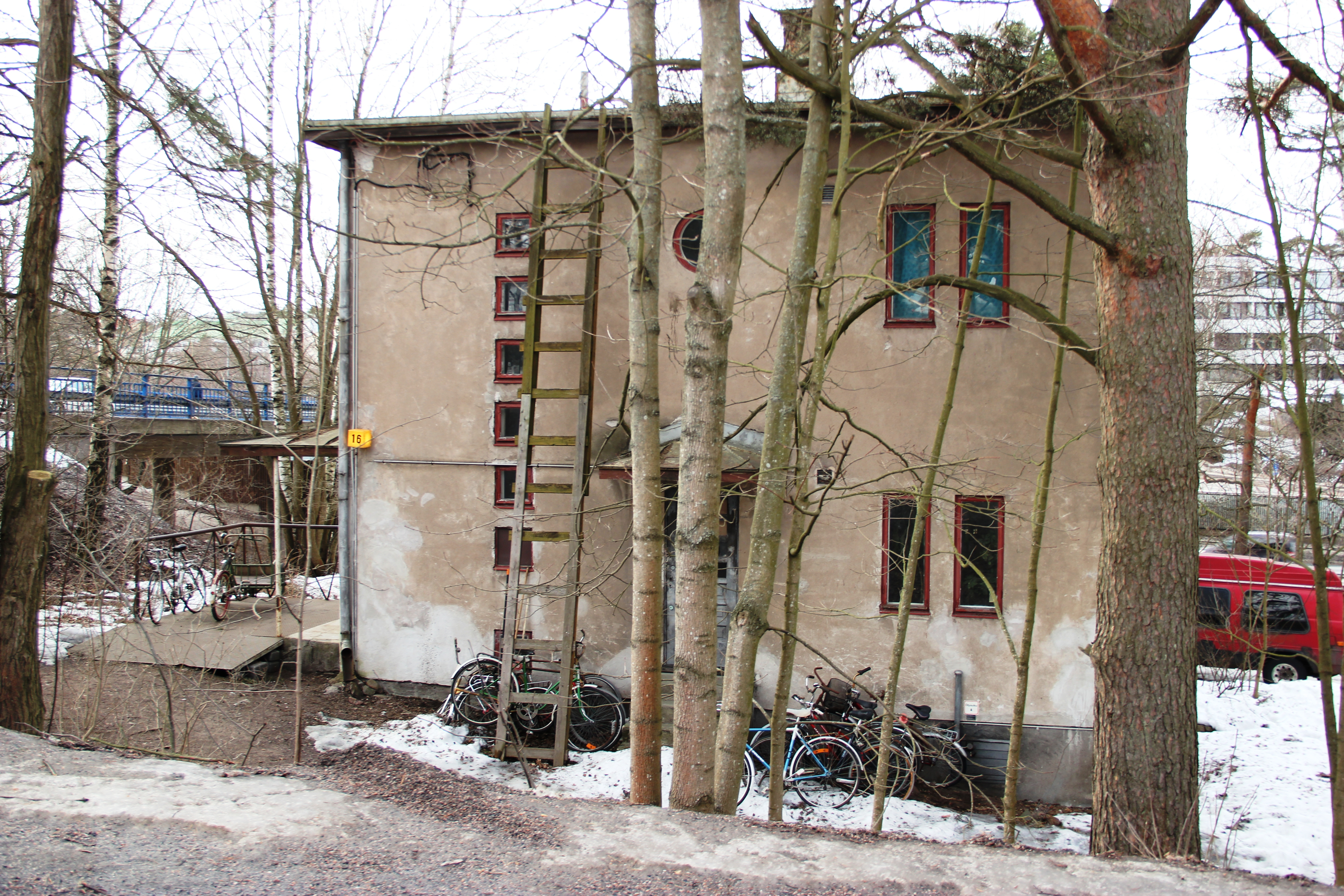 Vuonna 1939 rakennettu funkistalo, joka on moottoripyöräkerhon käytössä. , Kivihaantie 16, Kivihaka, Helsinki.